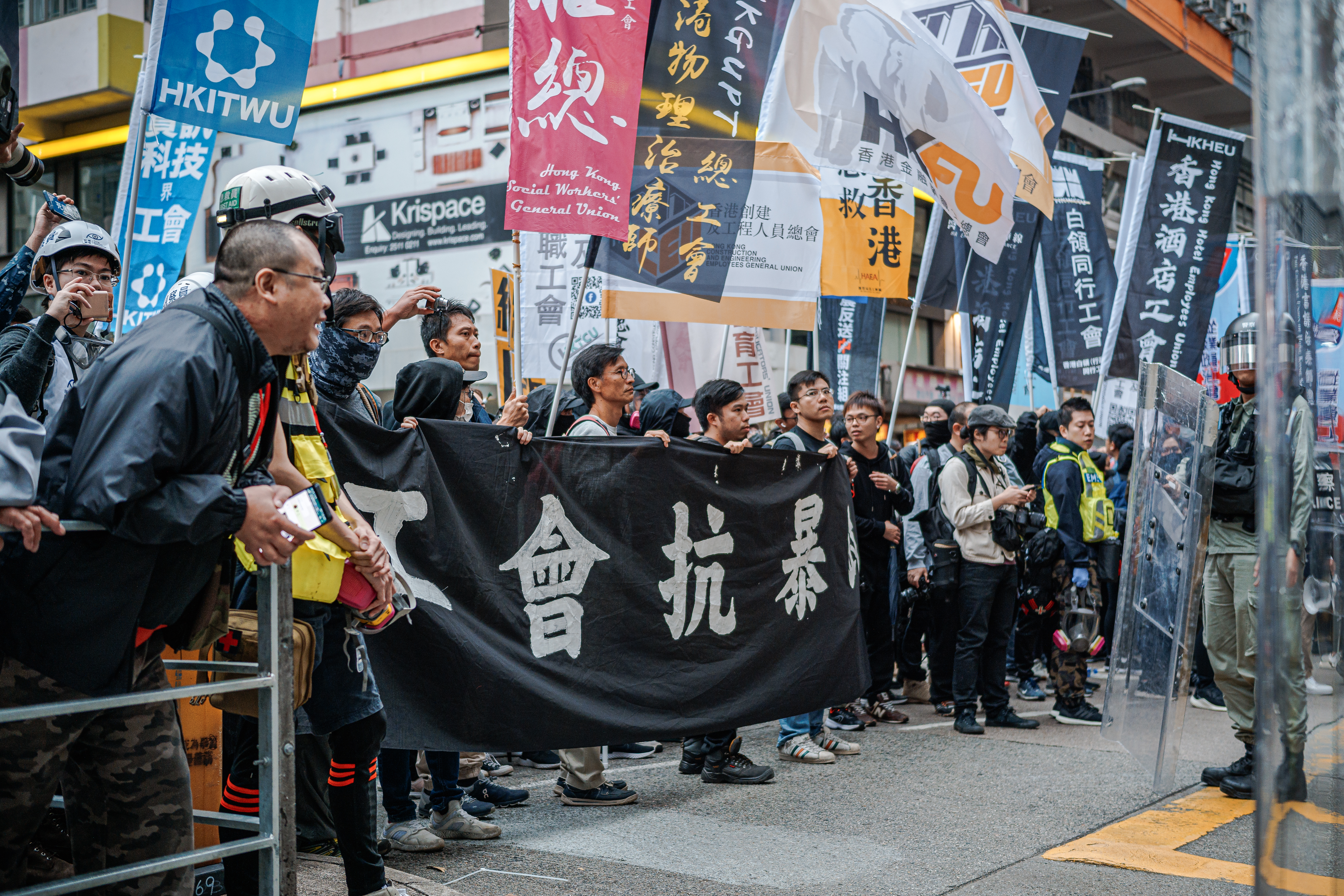 SDIM0529